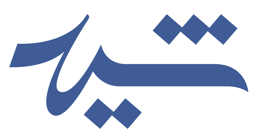 نشانه فارسی شید - اثر محمد خاکی فیروز